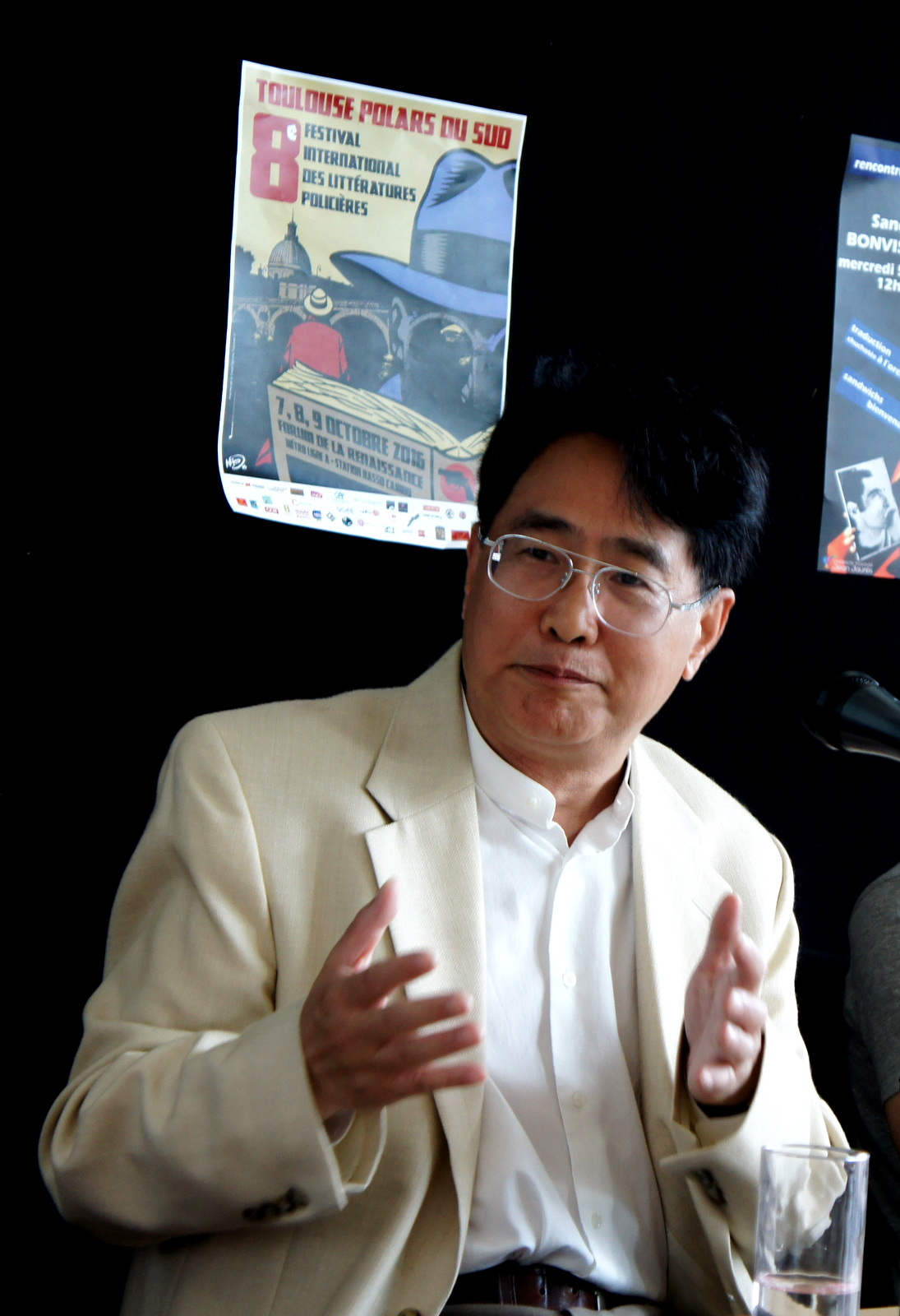 Qiu Xiaolong